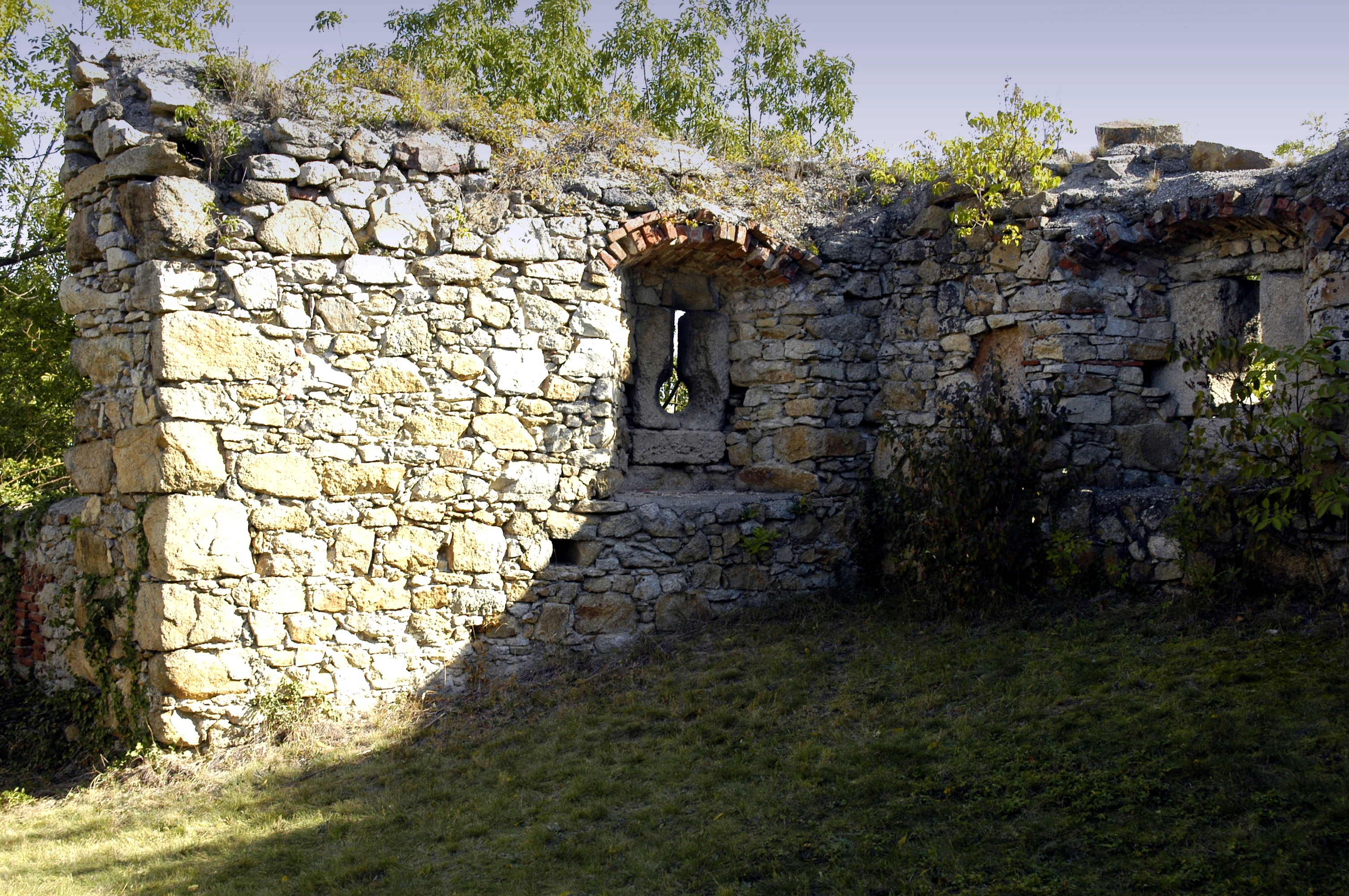 Schrattenthal - Schloss Befestigungsmauer Dieses Bild wurde anlässlich des österreichischen Tags des Denkmals 2012 in Niederösterreich eingereicht.